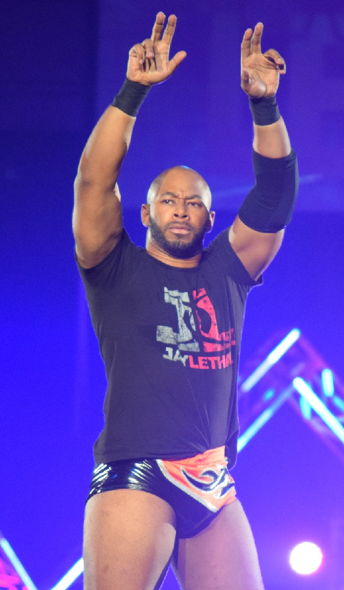 2016年11月5日 大阪府立体育会館「POWER STRUGGLE」 ジェイ・リーサル